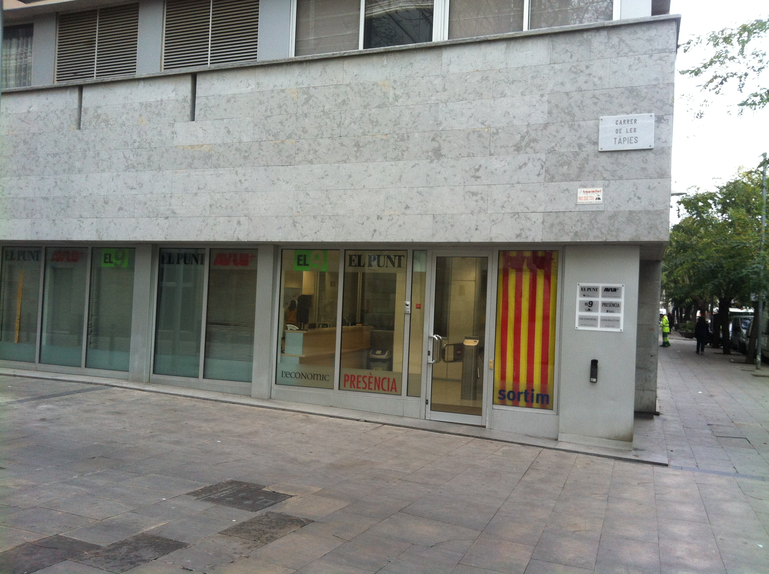 Oficines el Punt avui raval